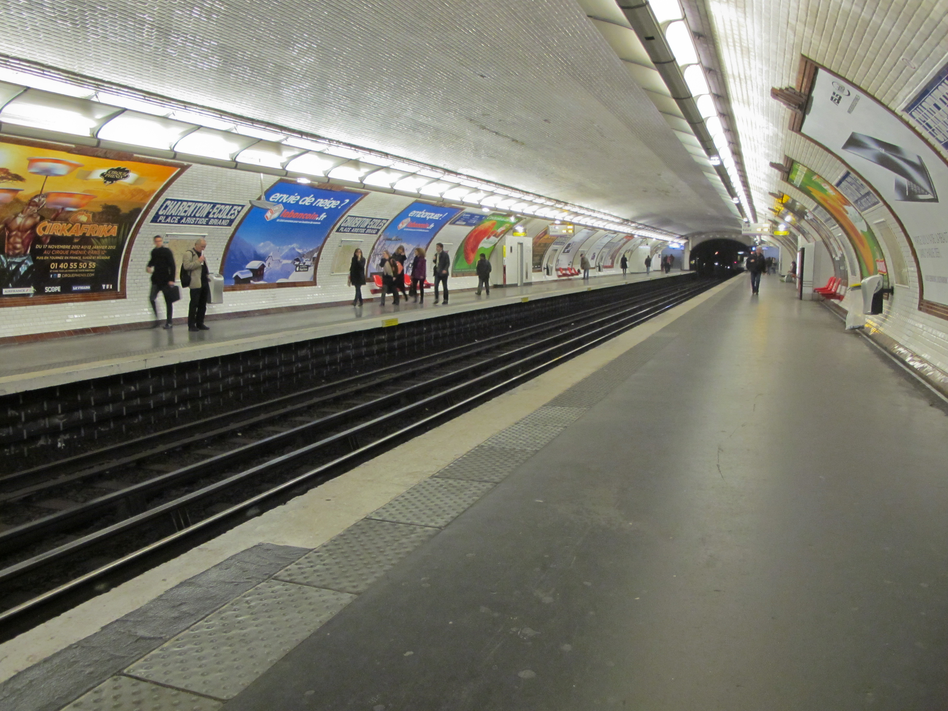 StationCharenton - Écoles. Ligne 8 du métro de Paris - Charenton-le-Pont, France